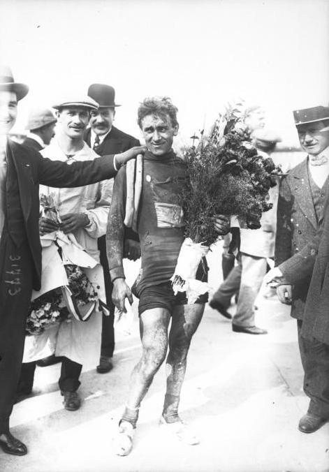 Philippe Thys, entouré de spectateurs, à l'arrivée du Tour de France 1913